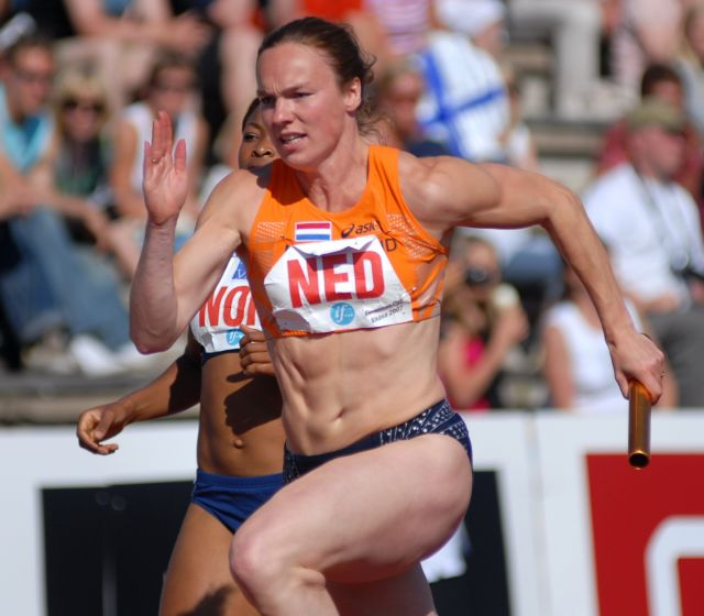 Pascal van Assendelft during Europacup 2007